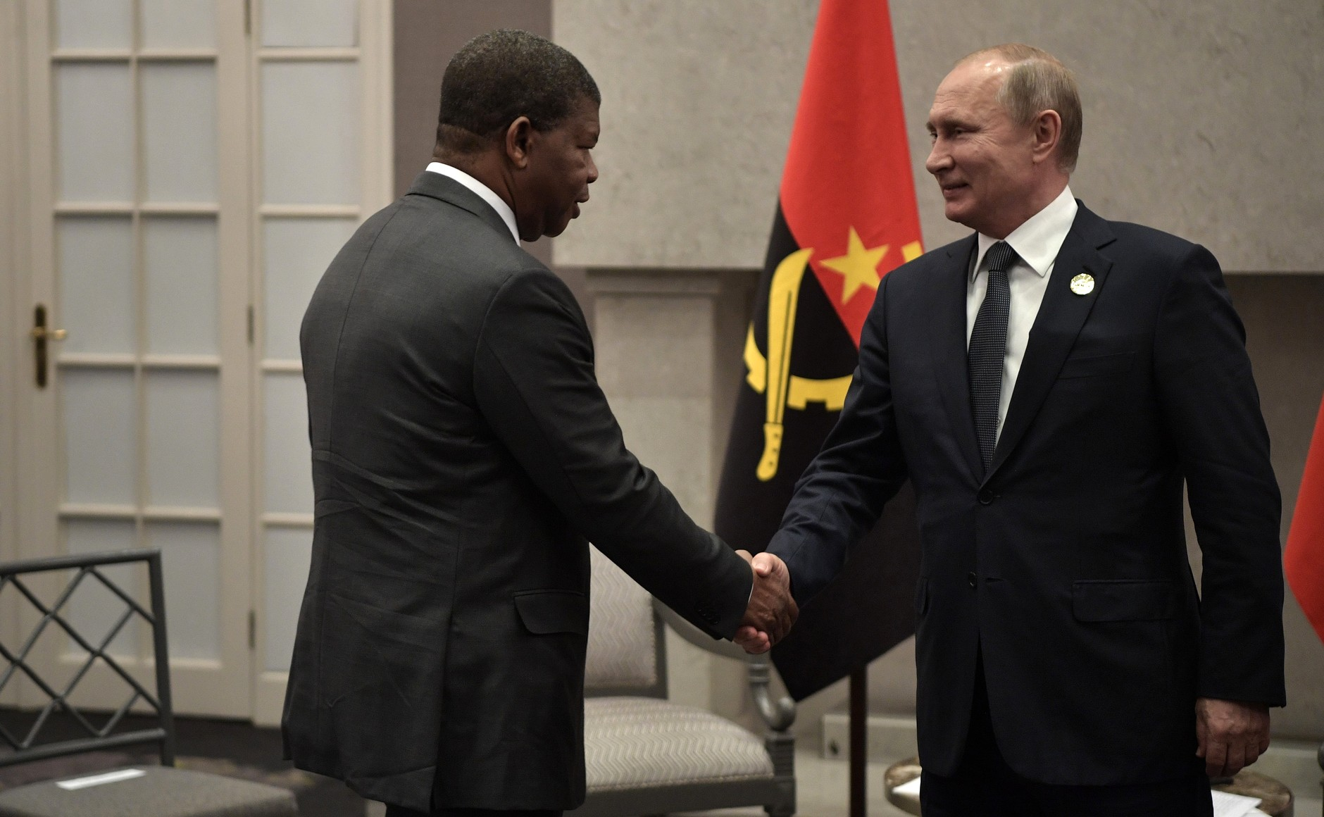 С Президентом Республики Ангола Жоау Лоуренсу.